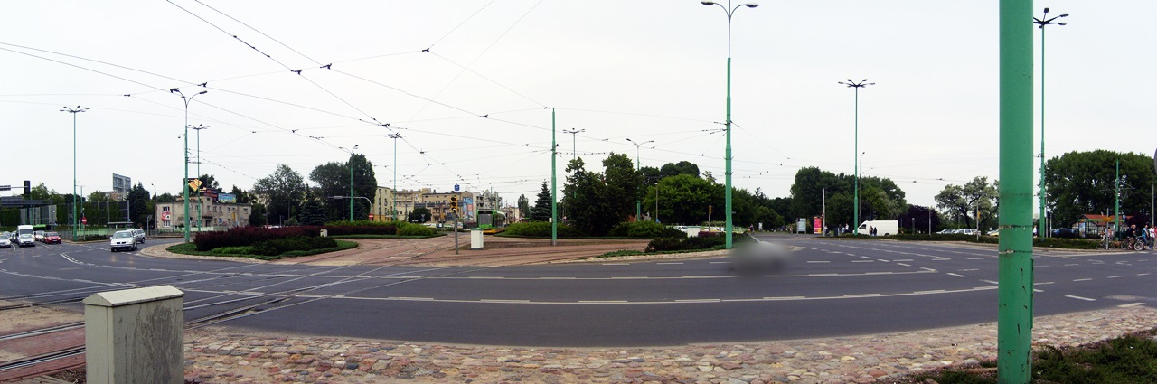 Poznań, Rondo Śródka